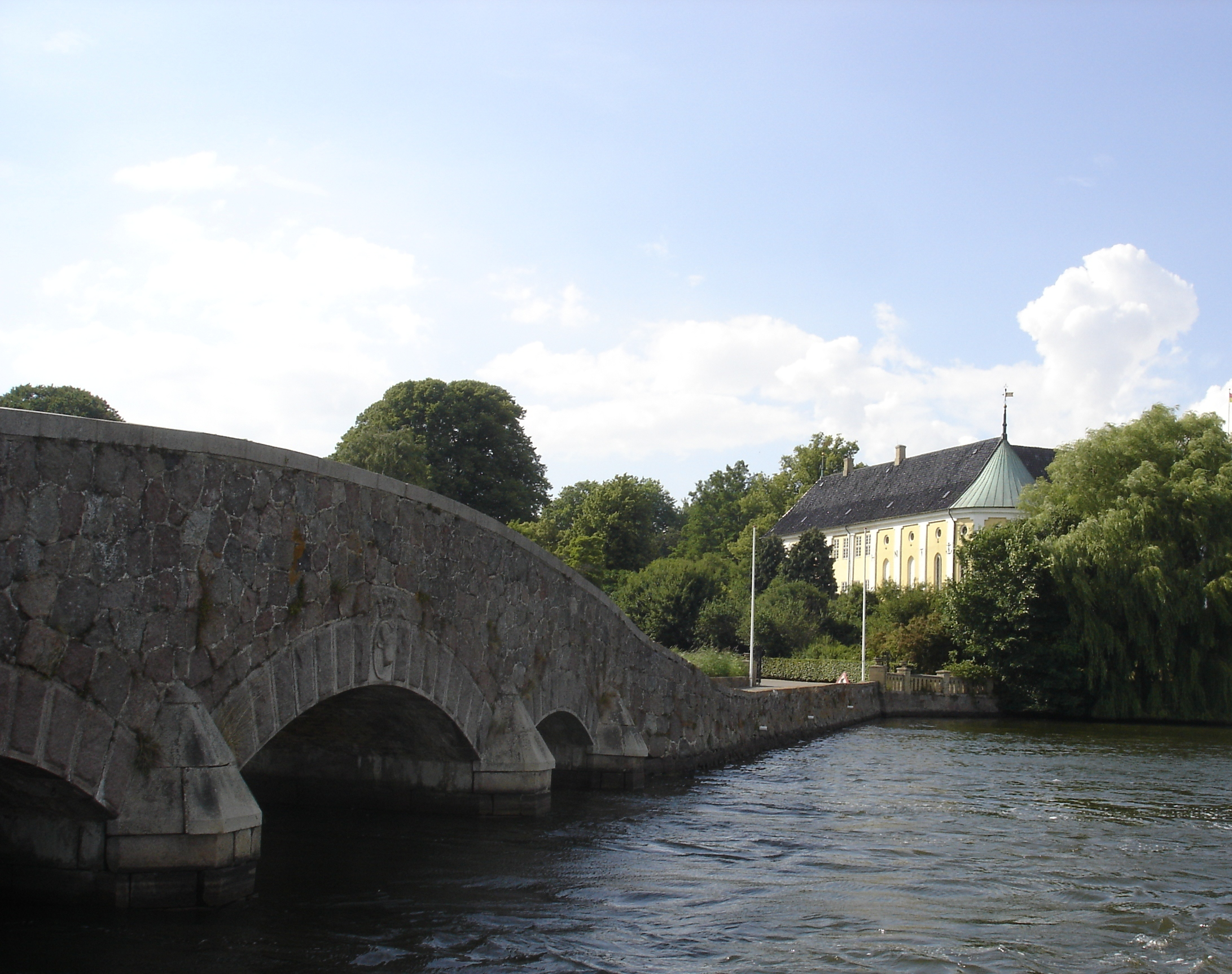 Broen til Gavnø over den østlige gren af Karrebæk Fjord